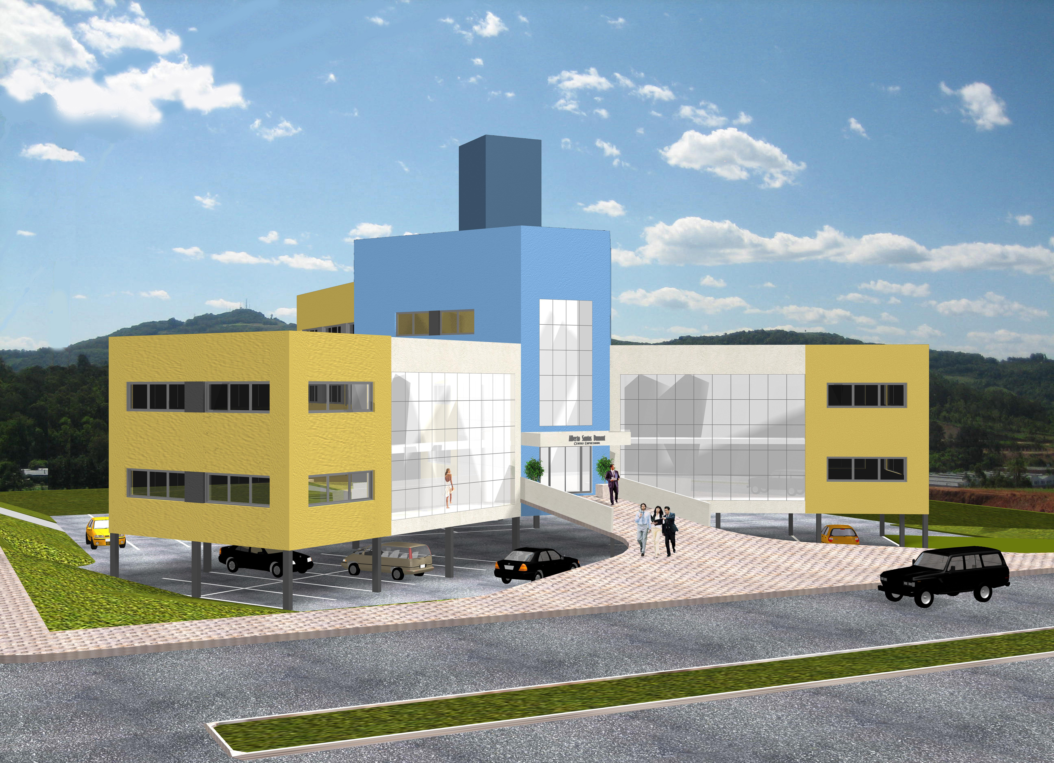 Centro Empresarial Alberto Santos Dumont